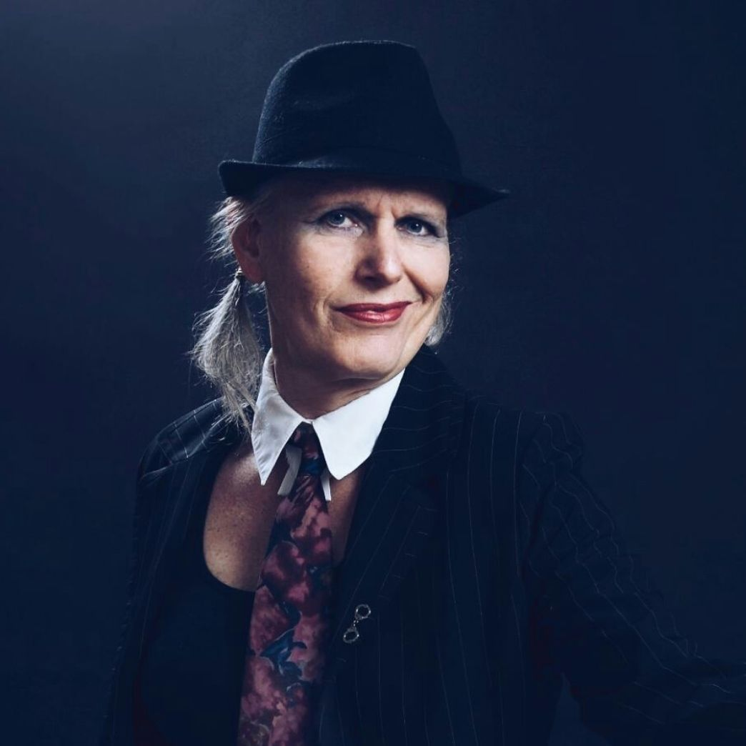 Ria Klug, autoportrait